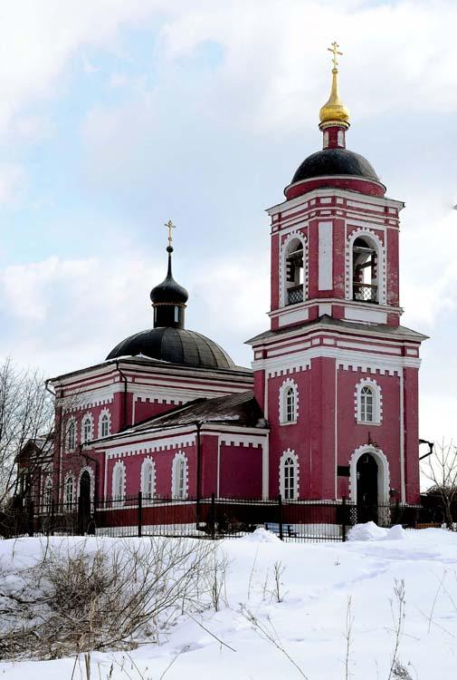 Храм Воскресения Словущего, село Сертякино Подольского района Московской области. Построен в 1859 году.